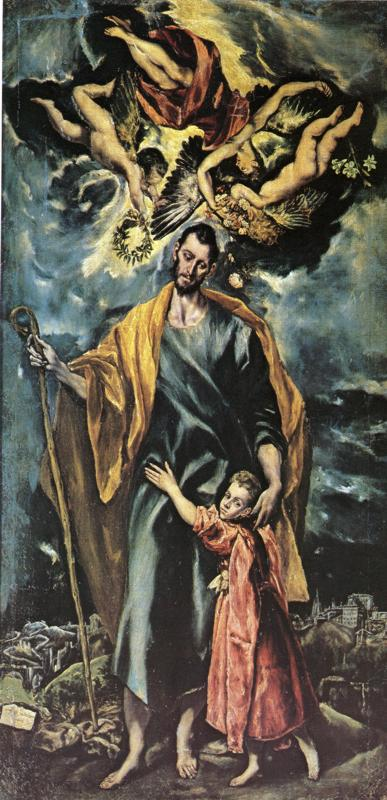 El lienzo representa a San José junto a su hijo, el Niño Jesús.